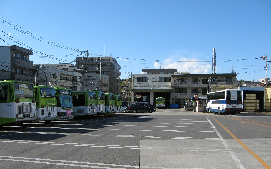 国際興業バス池袋営業所外観。敷地外より撮影。